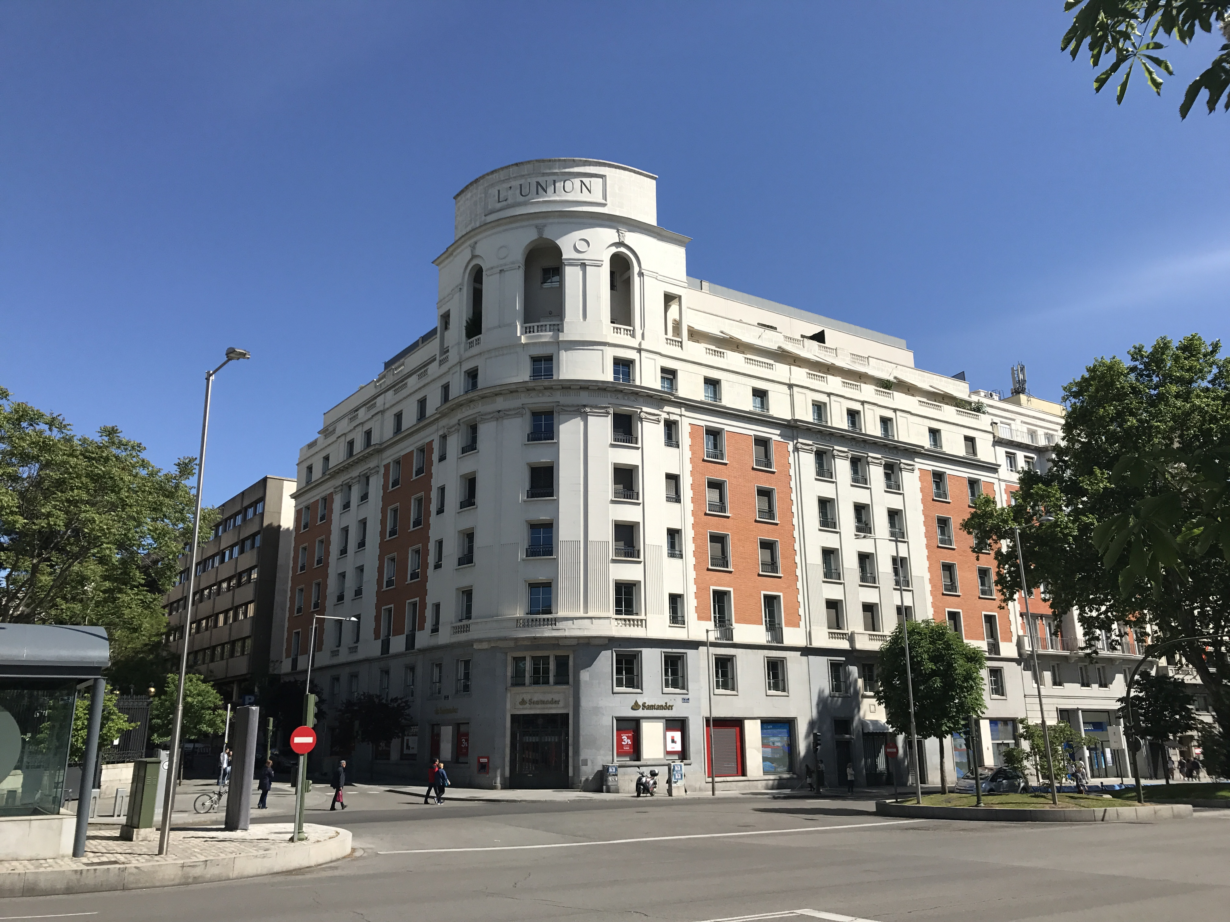 Edificio Restura, en el nº 18 del Paseo de Recoletos de Madrid (España), en el distrito de Salamanca. Construido por César de la Torre Trassierra y Fernández-Duro entre 1947 y 1952